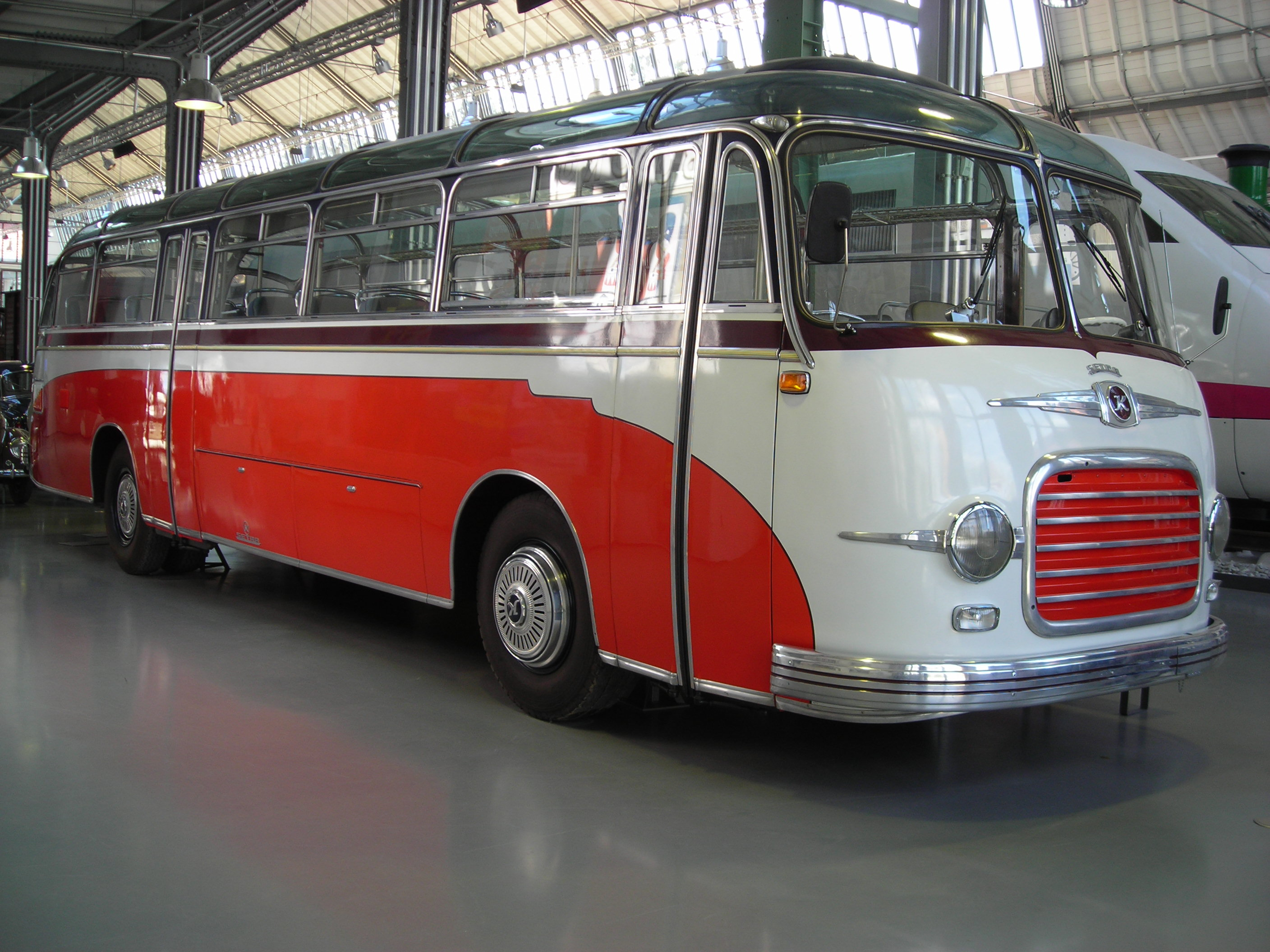 Reisebus Kässbohrer-Setra S 11 mit Panoramascheiben, Bj. 1958 — Exponat im Deutschen Museum Verkehrszentrum München, Inv.-Nr. 1997-234